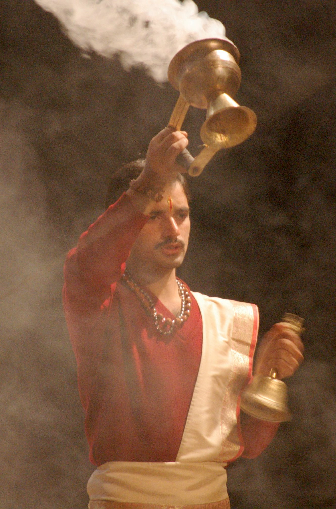 A puja in progress Pooja, Hindu prayers India 2009